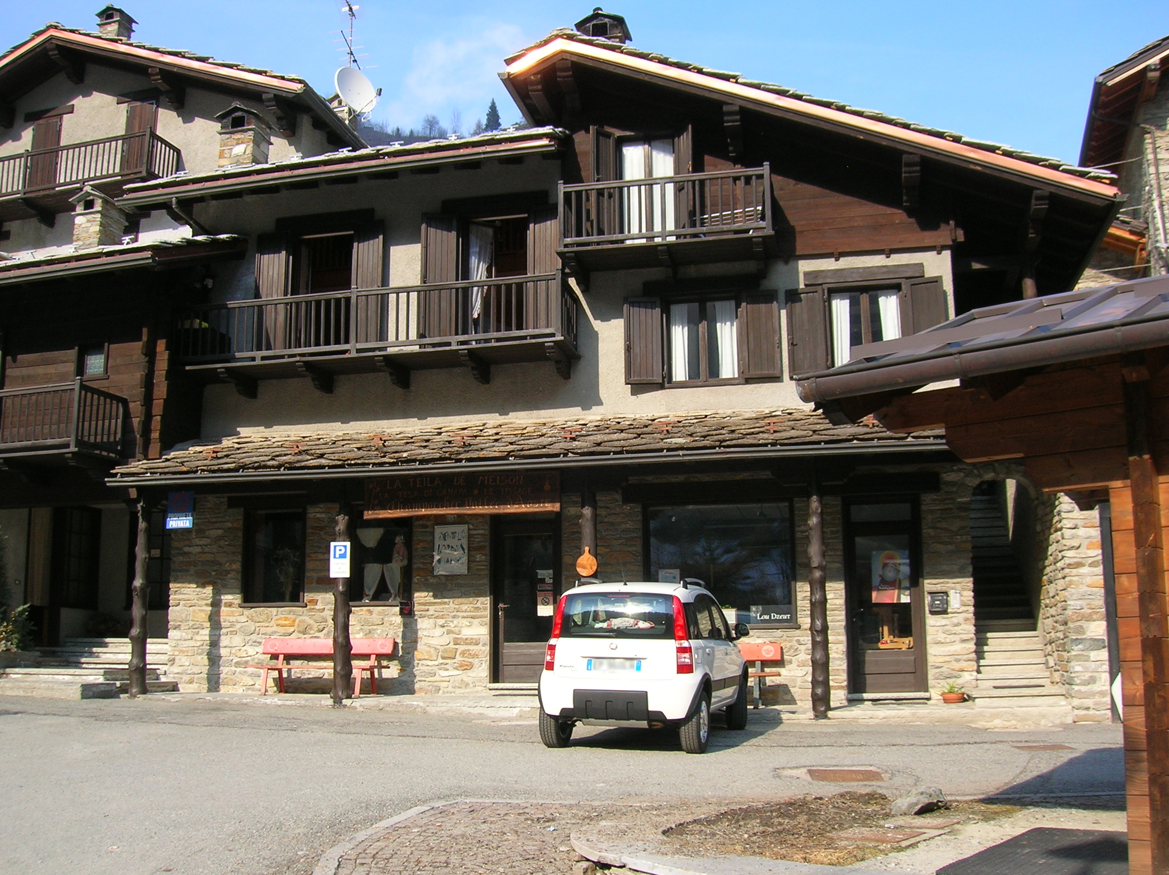 sede della Cooperativa “Lo Dzeut" nei pressi dell'Ecomuseo della Canapa, villaggio Chardonney, Champorcher, Valle d'Aosta, Italia.